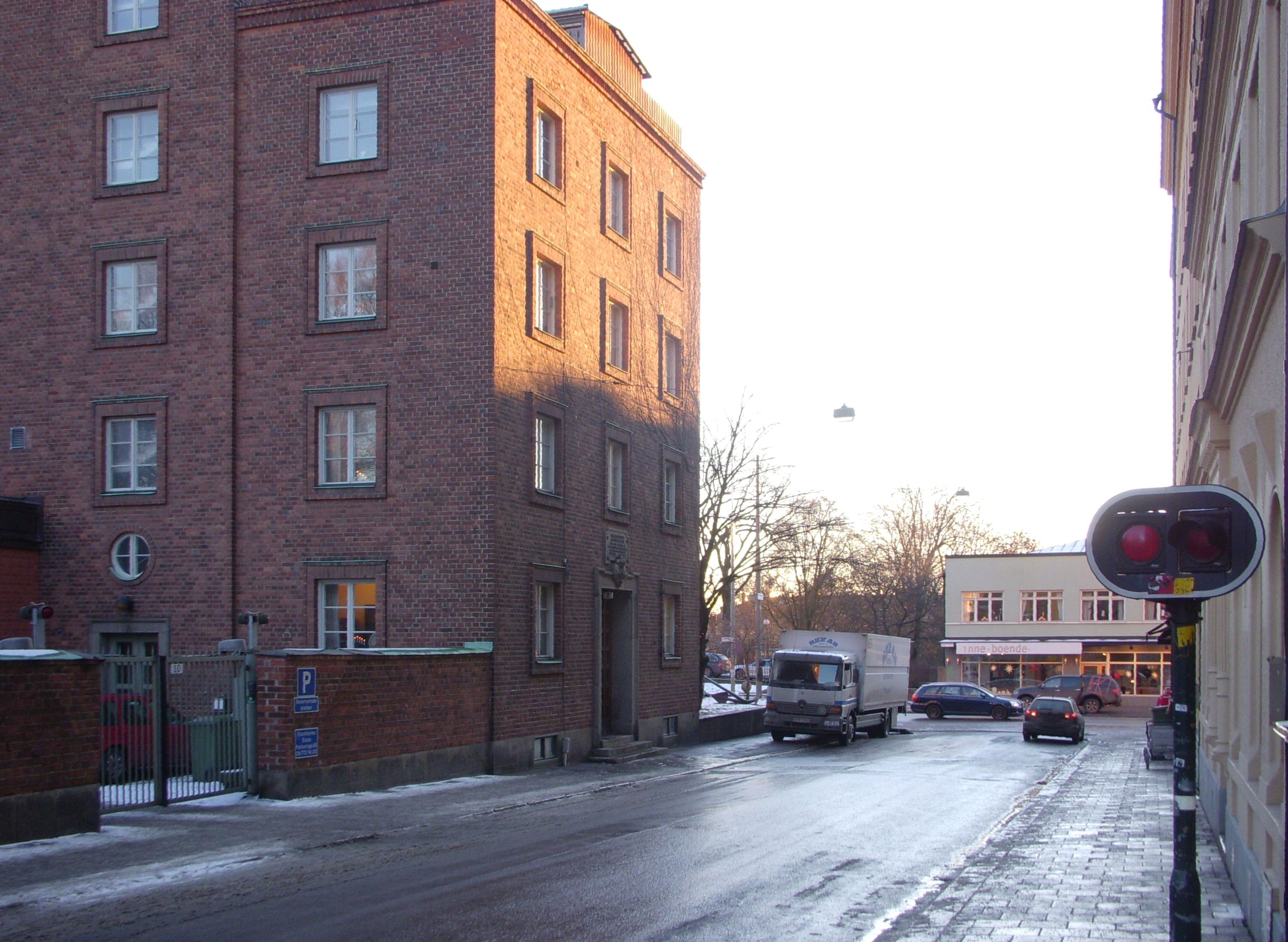 Kronobergsgatan på Kungsholmen i Stockholm, vy mot söder